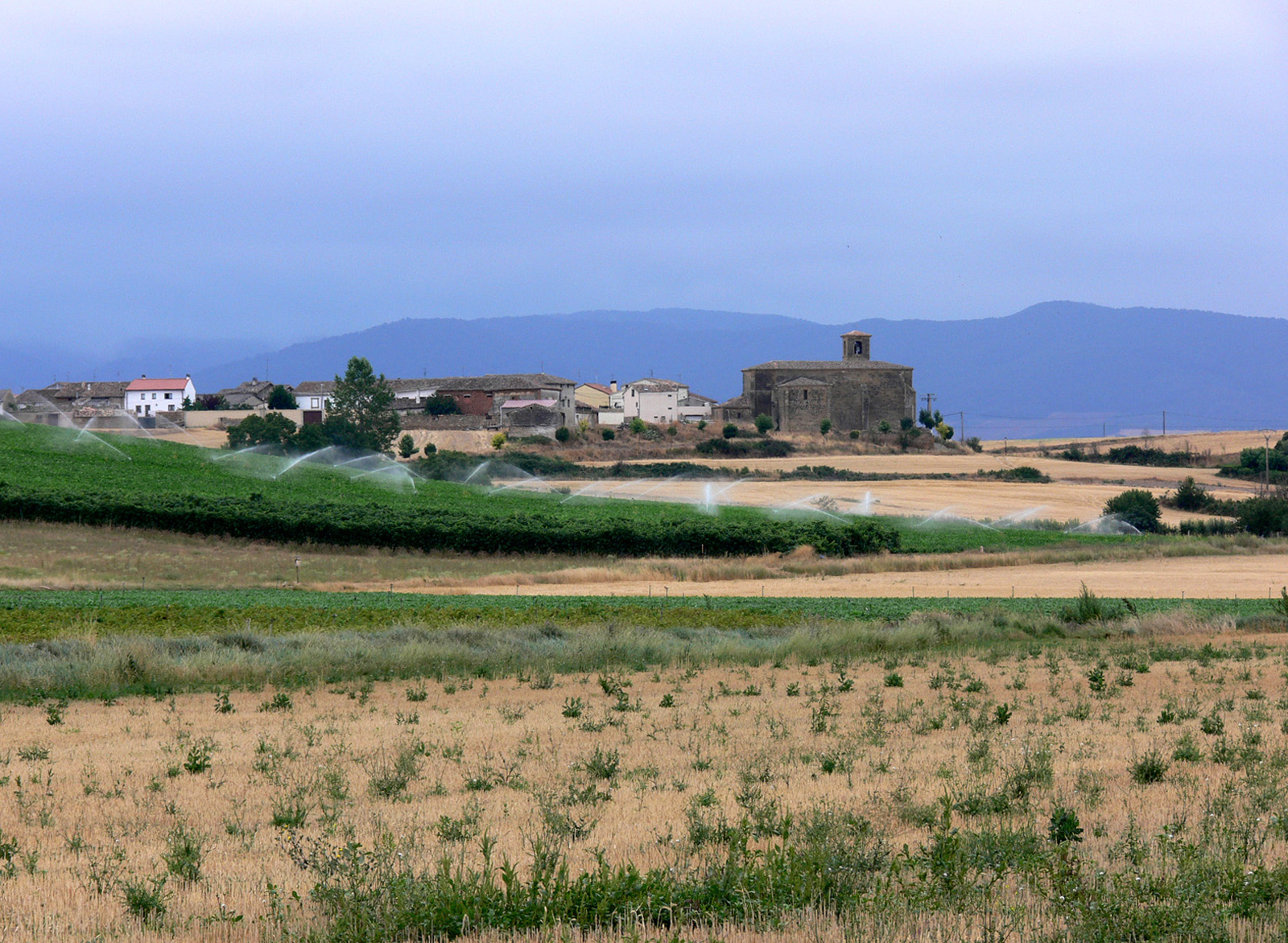 Madrid de los Trillos, aldea de Cidamón en La Rioja, España.